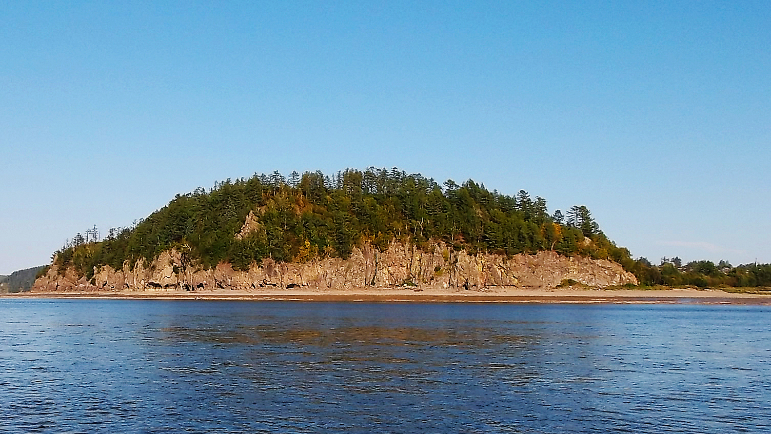 Сопка Лумукан, вид со стороны Тугурского залива